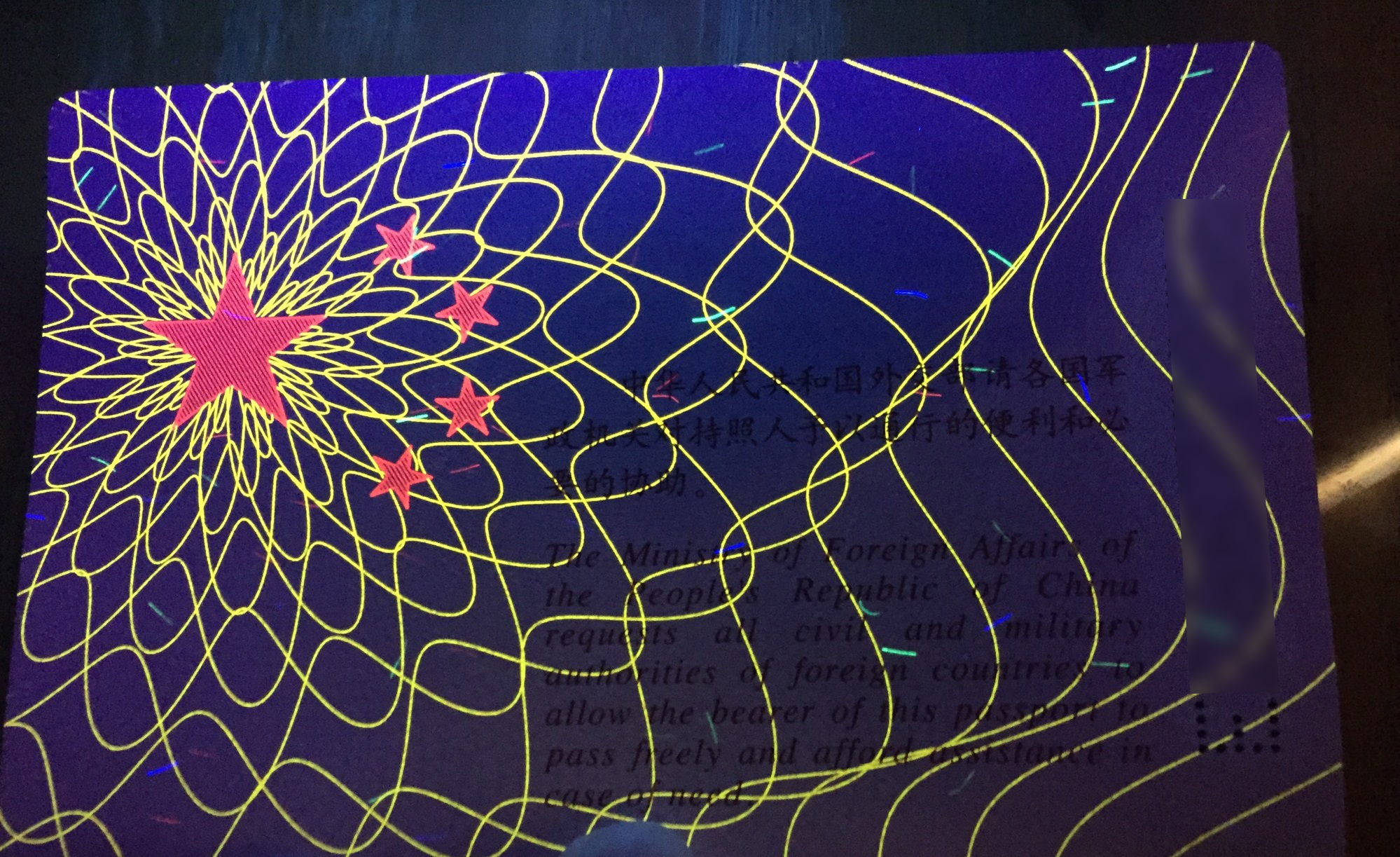 中文（中国大陆）: 黑光灯下的中国电子护照声明页